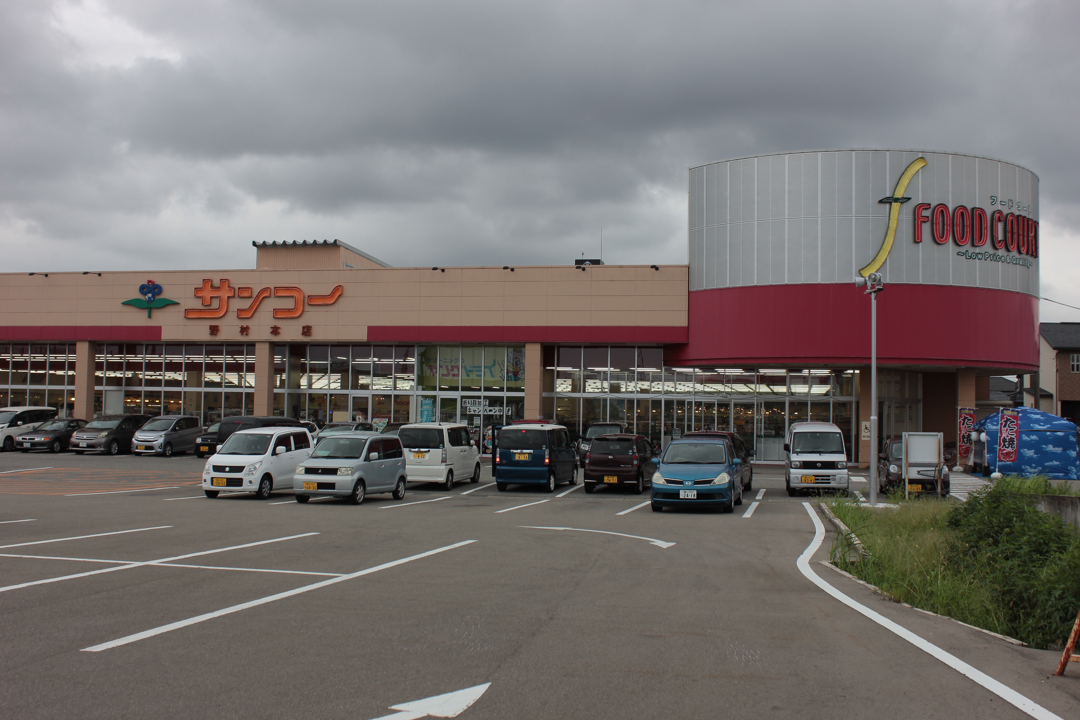 サンコー野村本店（富山県高岡市） Canon EOS Kiss X5